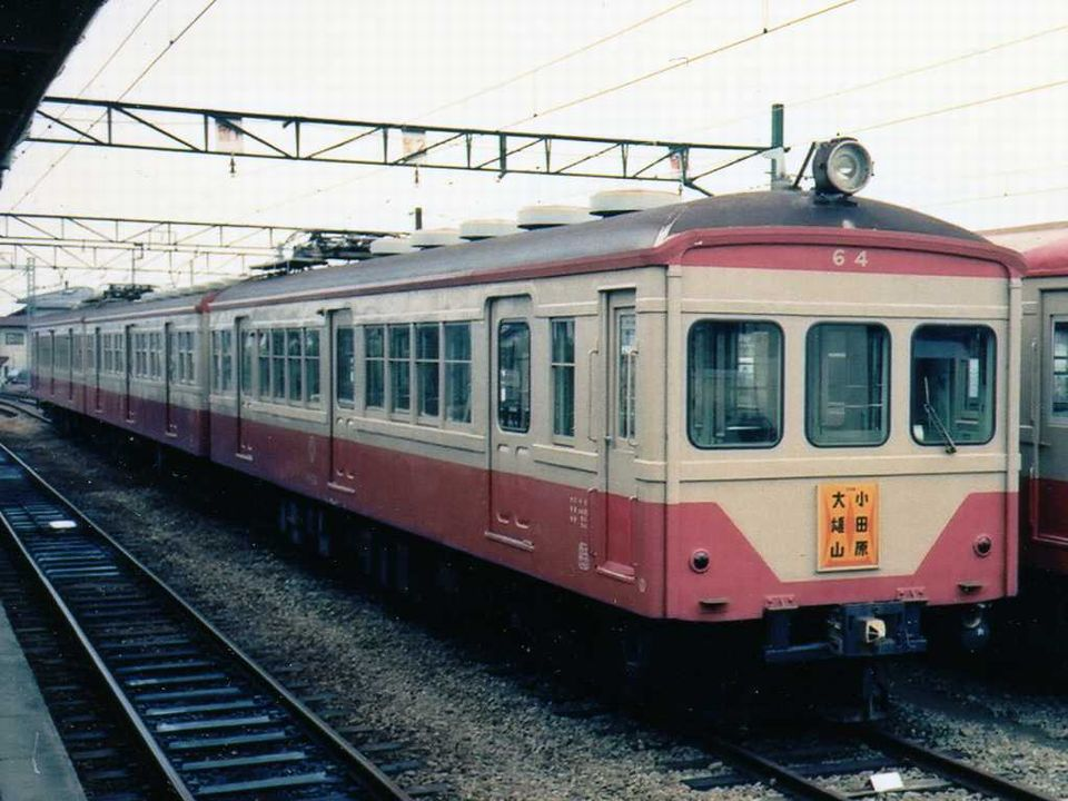 Izuhakone Moha64 at Daiyuzan Sta.